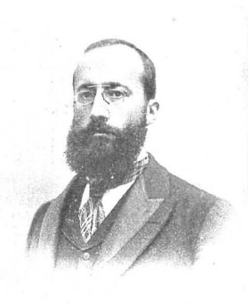 Ramón Menéndez Pidal, de la Real Academia Española. Ingresó el 19 del actual. Fotografía de Christian Franzen.